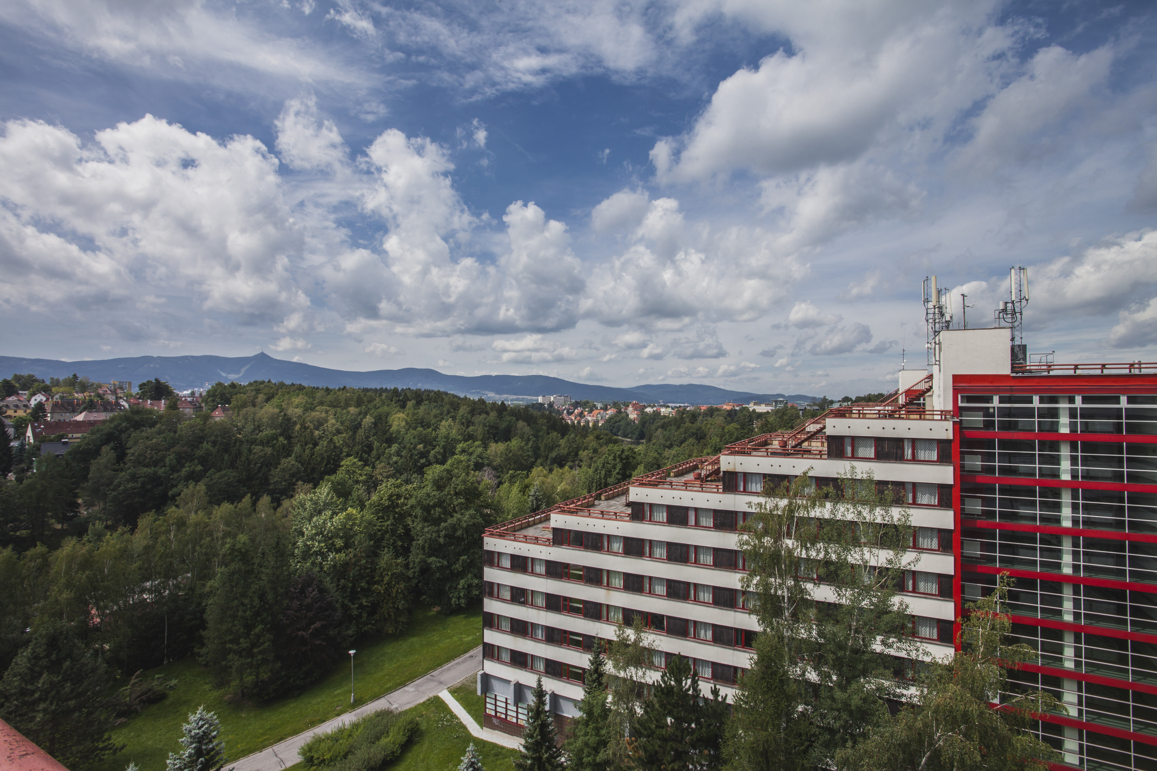 Студенты из г. Либерец проживают в лучшем общежитии в Чехии. Фото: Дита Хавранкова